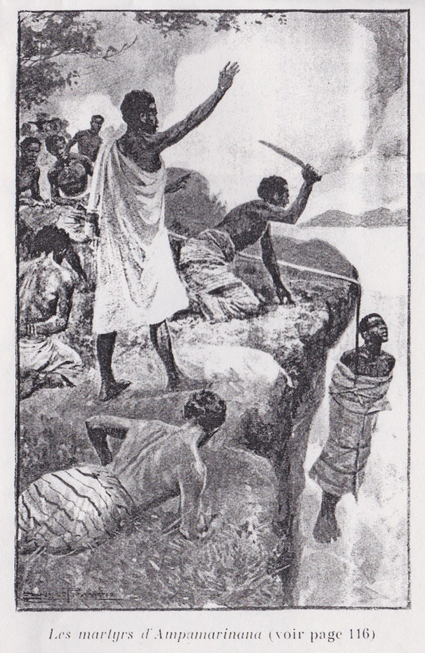 Executie van Malagassische proselieten. Gravure de la Société des missions évangéliques